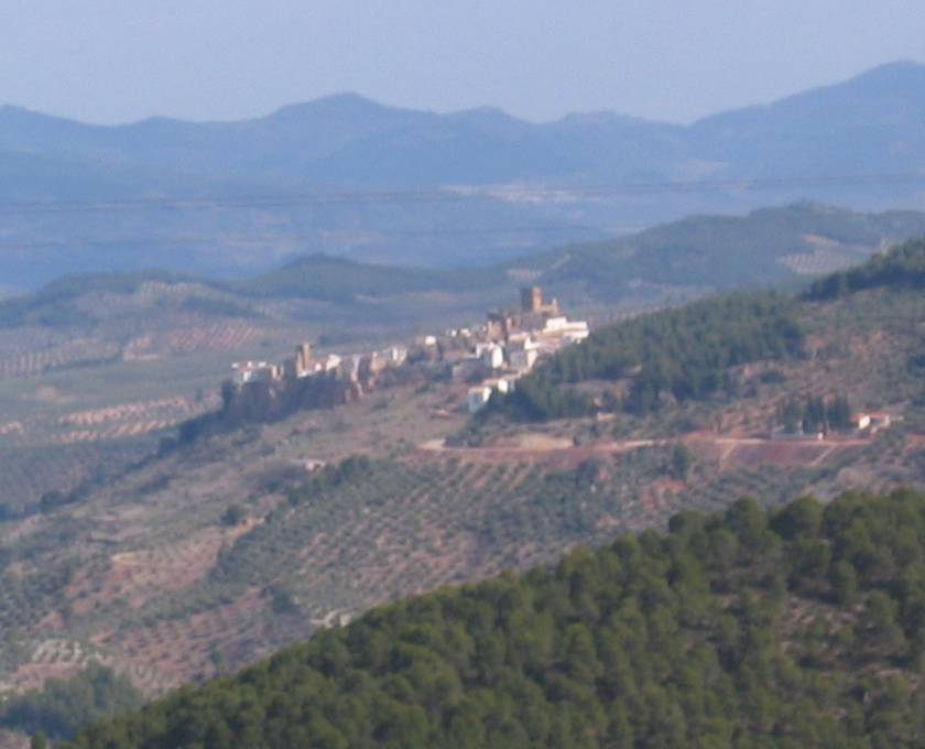 Vista de Hornos de Segura